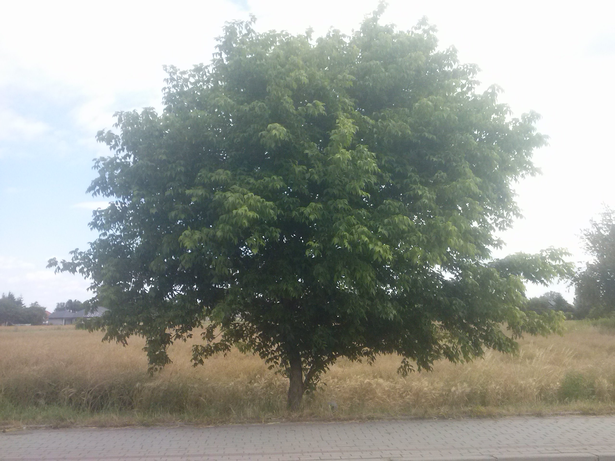 Kłokoczka przydrożna w Dębnie